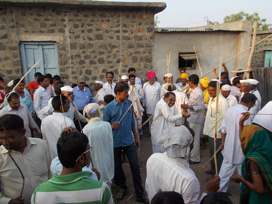 Holi festival of village